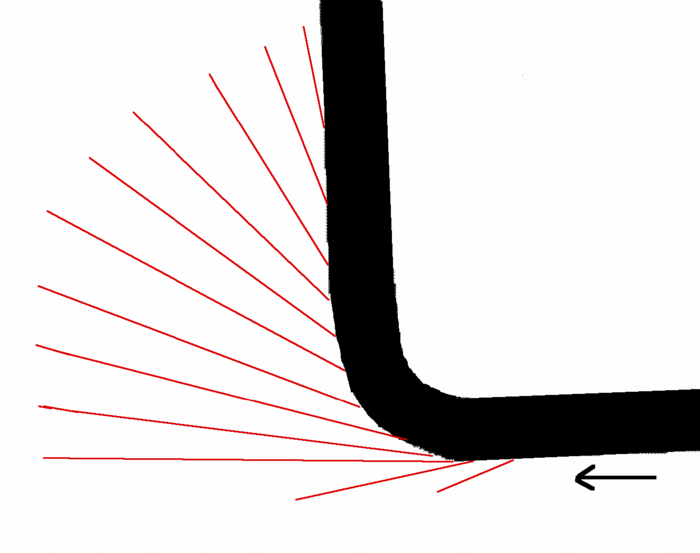 Strahlenmodell einer Rennstrecken-Kurve zur Berechnung der Auslaufzone (schematische Darstellung)